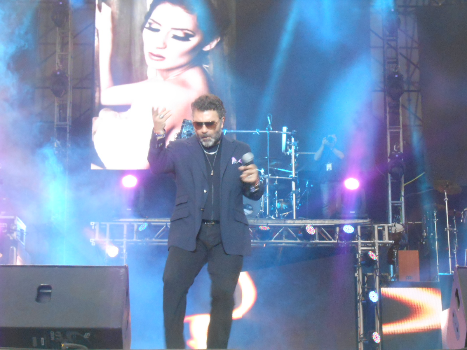 Manuel Mijares en el espectáculo gratuito en el Zócalo como parte de su gira Two'r Amigos con Emmanuel.